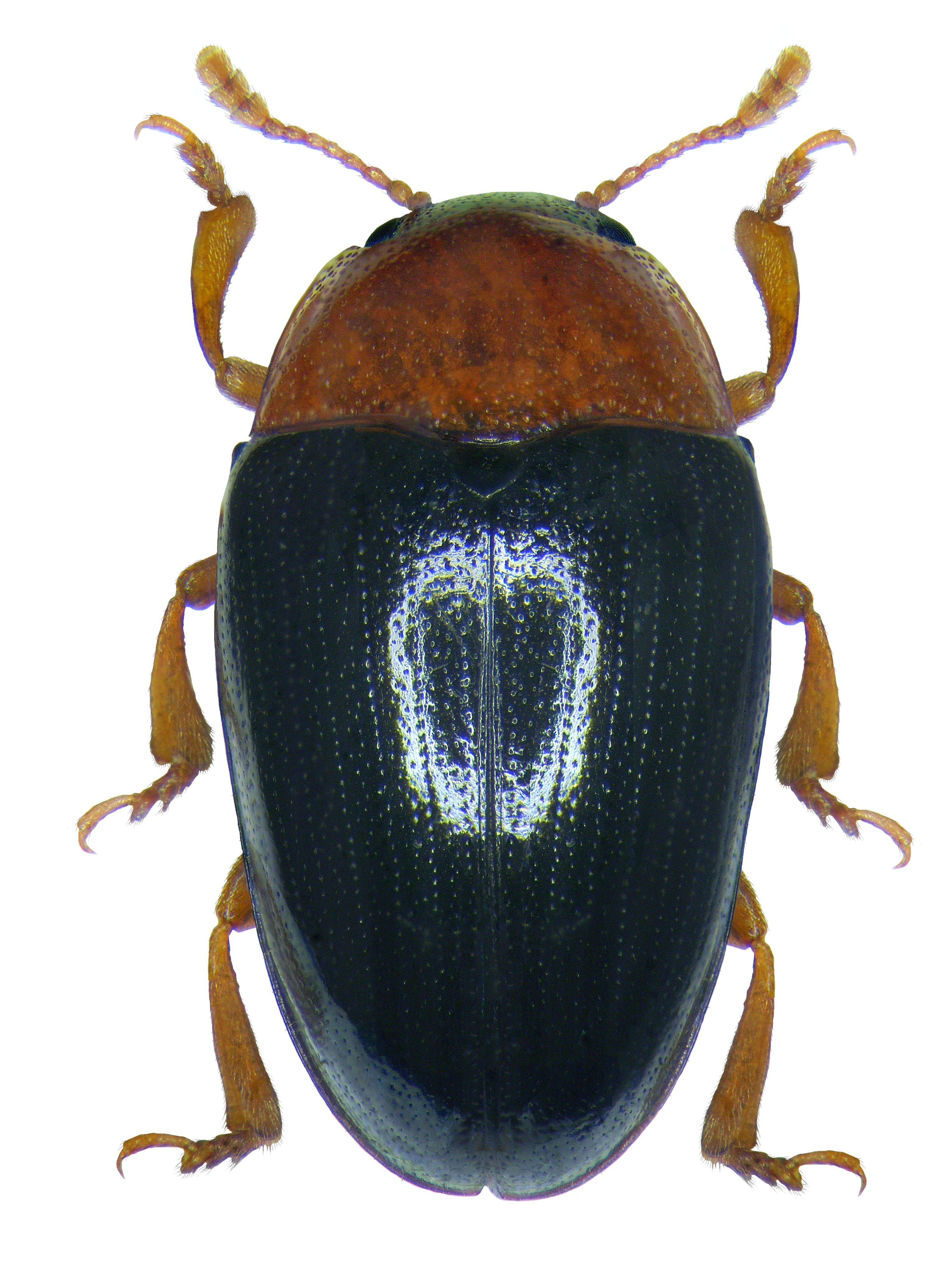 Familie: Erotylidae Grösse: 3,3-5 mm Verbreitung: Europa, sehr selten Ökologie: Entwicklung in Baumschwämmen Fundort: Germania, Unterfranken, Karsbach leg. det. A.Skale, 2004 Foto: U.Schmidt, 2008